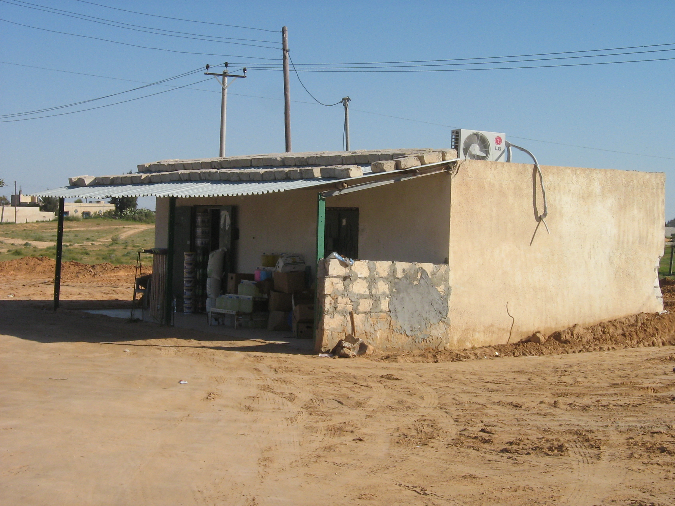 Продовольственный магазин в Бенгашире. Ливия.